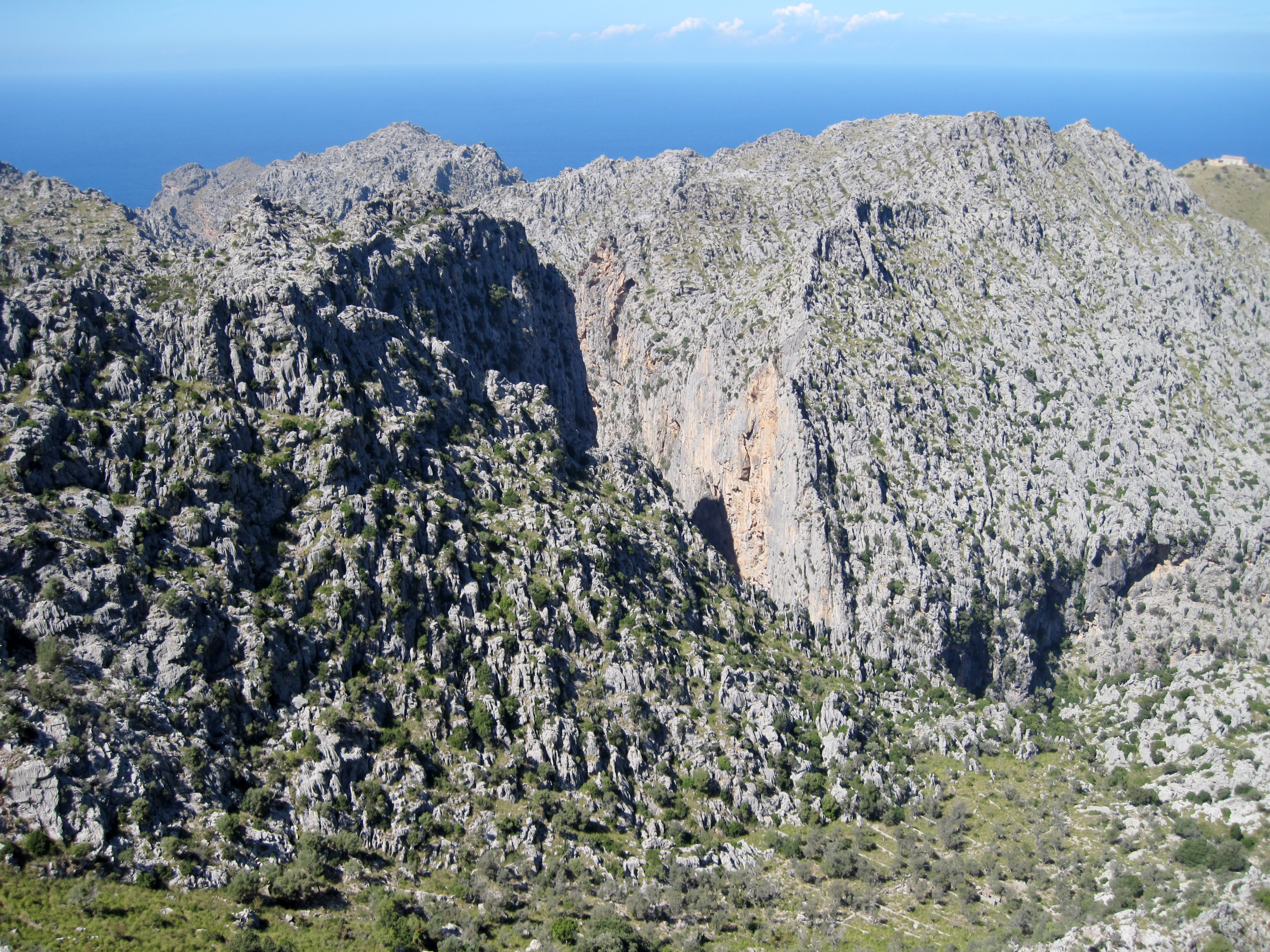 S’Entreforc, Bereich des Zusammenflusses der Sturzbäche Torrent de Lluc und Torrent des Gorg Blau zum Torrent de Pareis, Gemeinde Escorca, Mallorca, Spanien